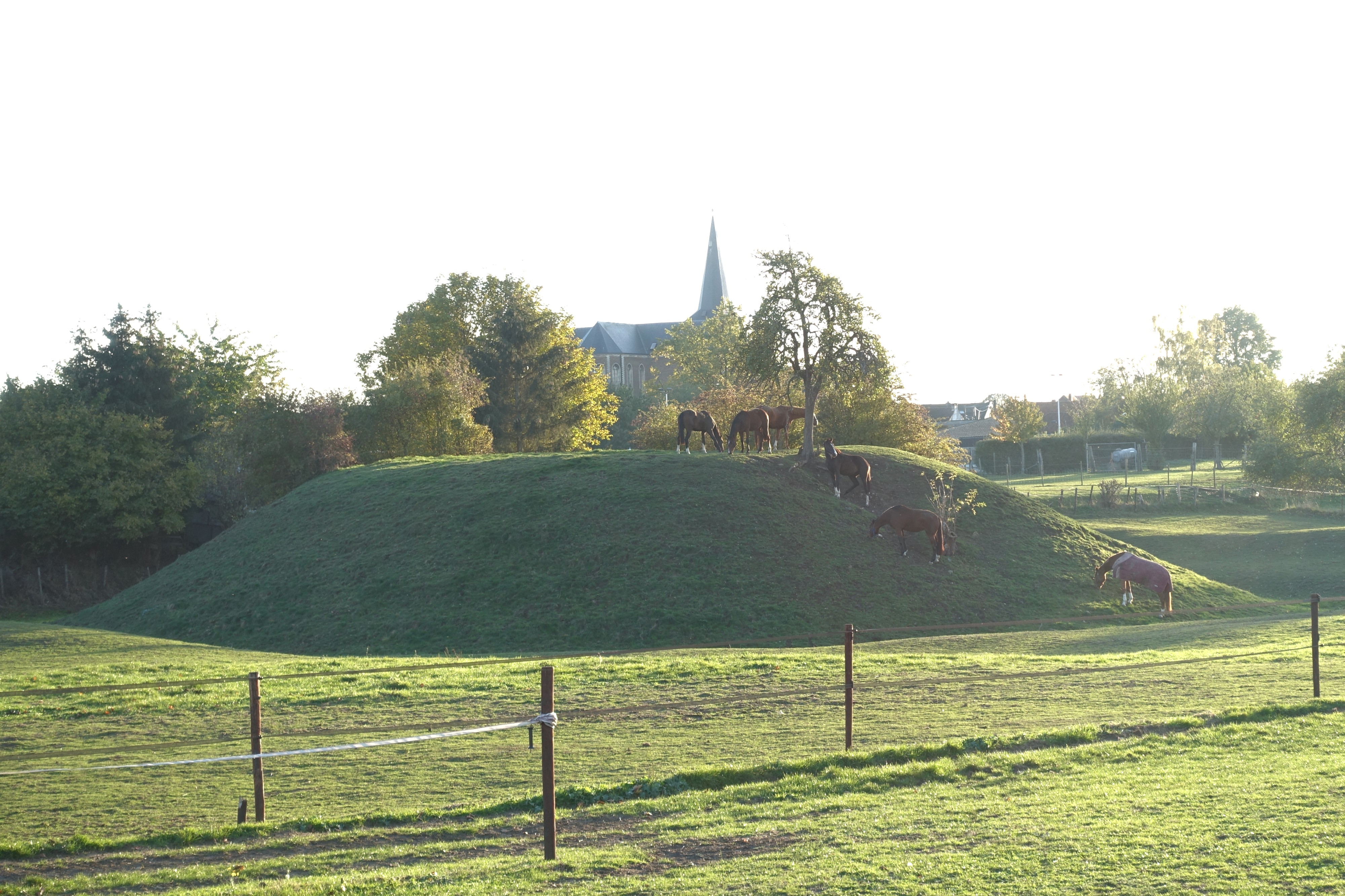 Motteheuvel in Millen (Riemst), doorsnede 36 meter, hoogte van 7 meter en gracht van 7 meter breed.